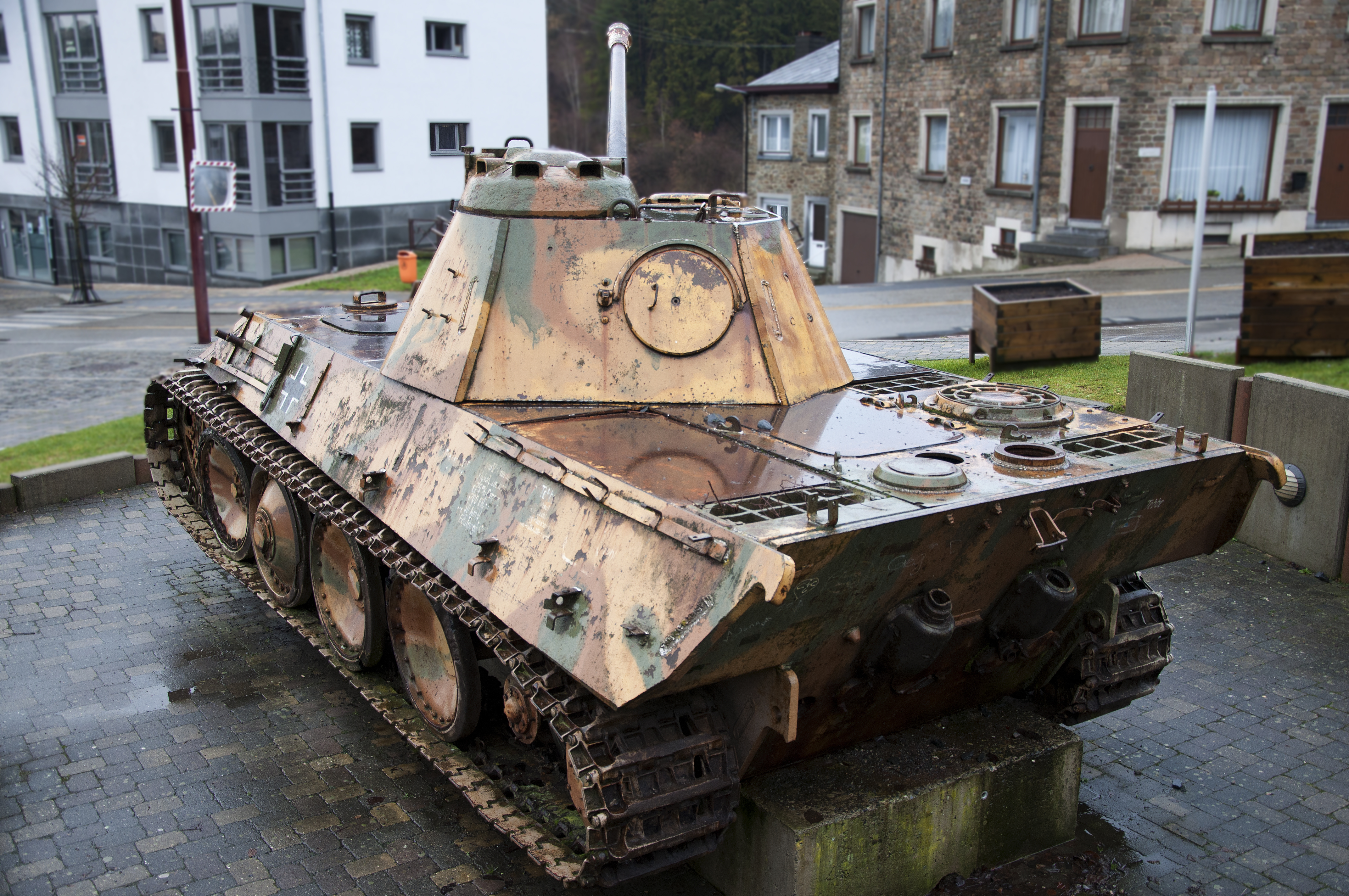 Panzerkampwagen V Panther te Houffalize, België